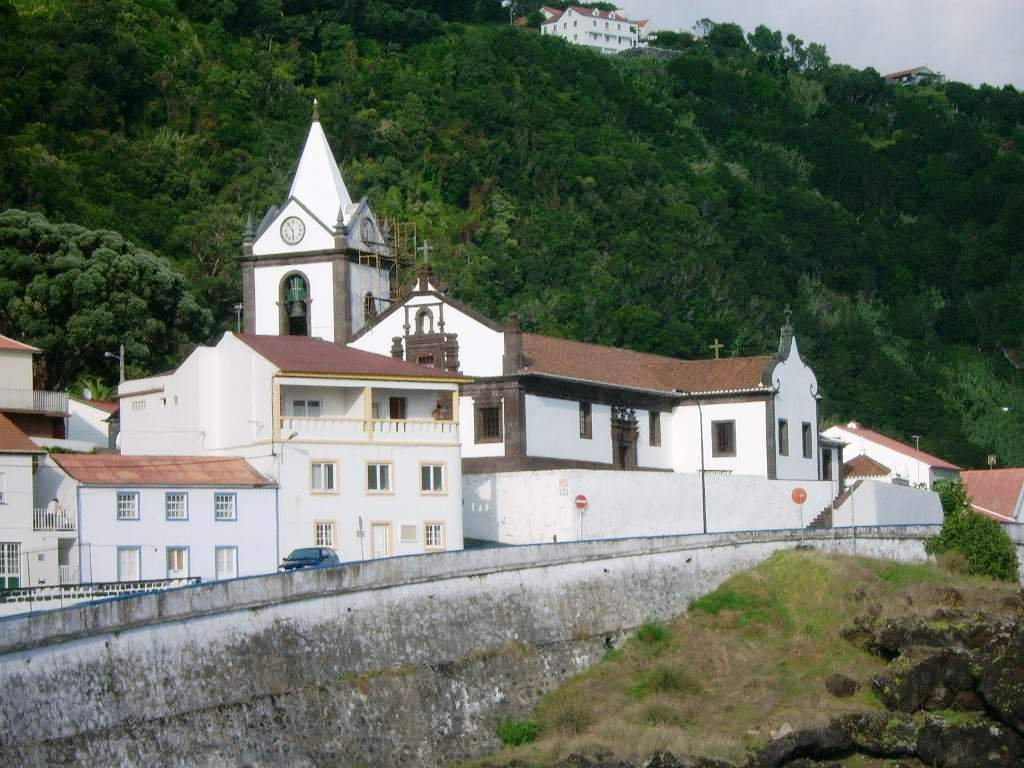 Vista parcial da Igraja da calheta, ilha de São Jorge, Açores, Portugal